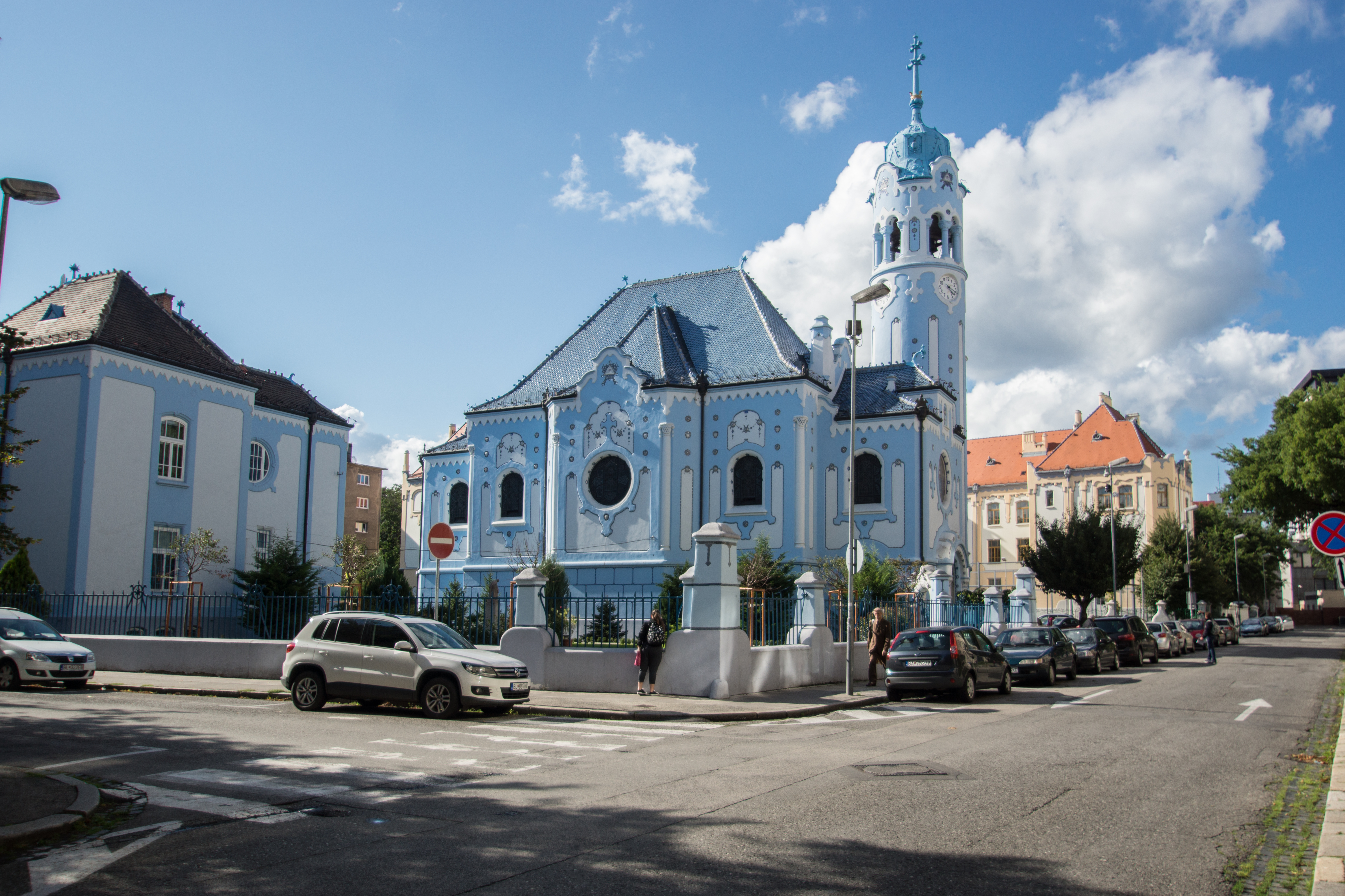 Iglesia Azul de Santa IsabelSlovenčina: Modrý kostol svätej Alžbety